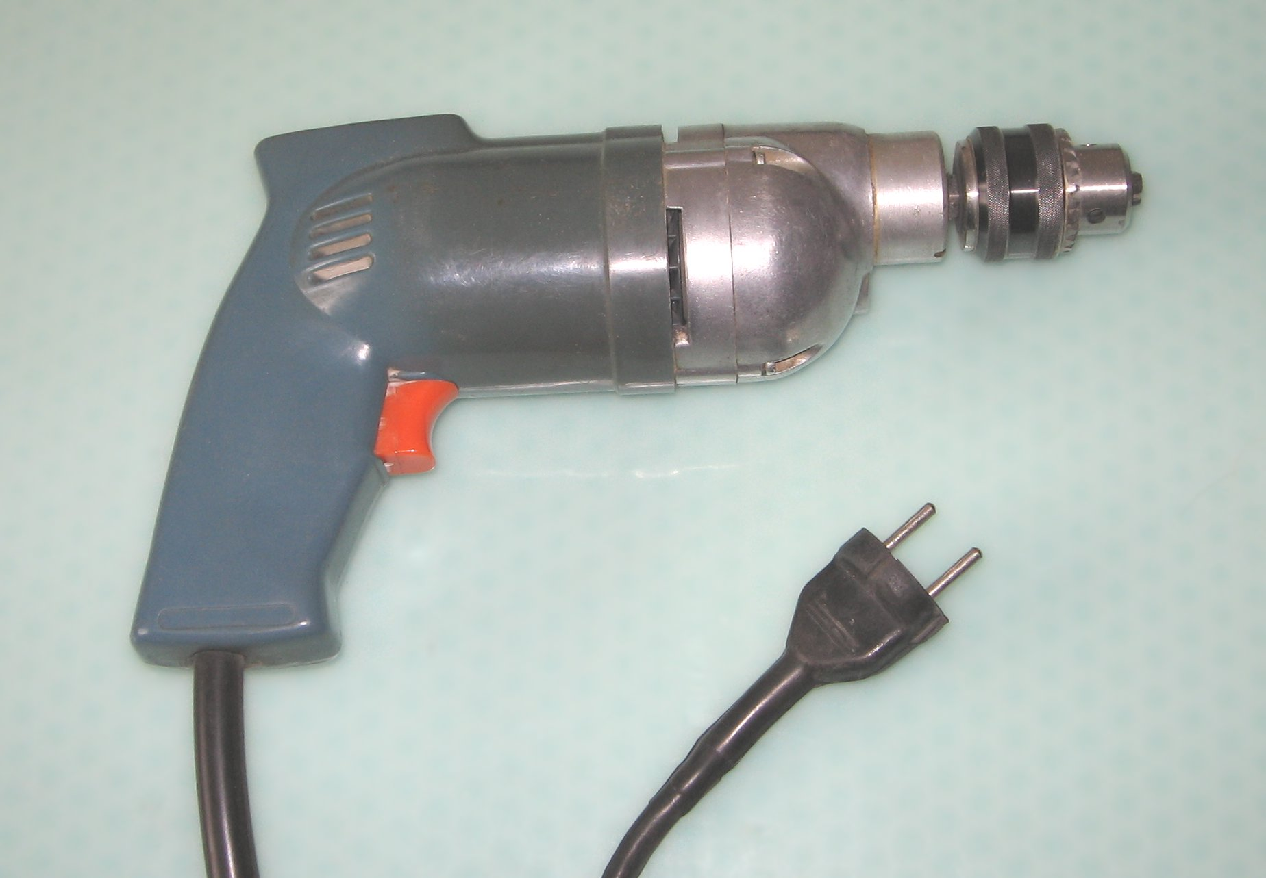 Elektra drilo La foto estis farita de mi mem.